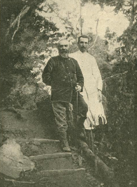 "M. de Lamothe, ancien commissaire du Congo"